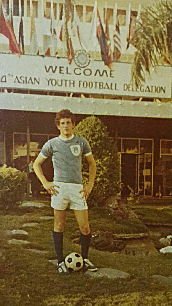 מאיר בלומנטל - שחקן כדורגל ישראלי